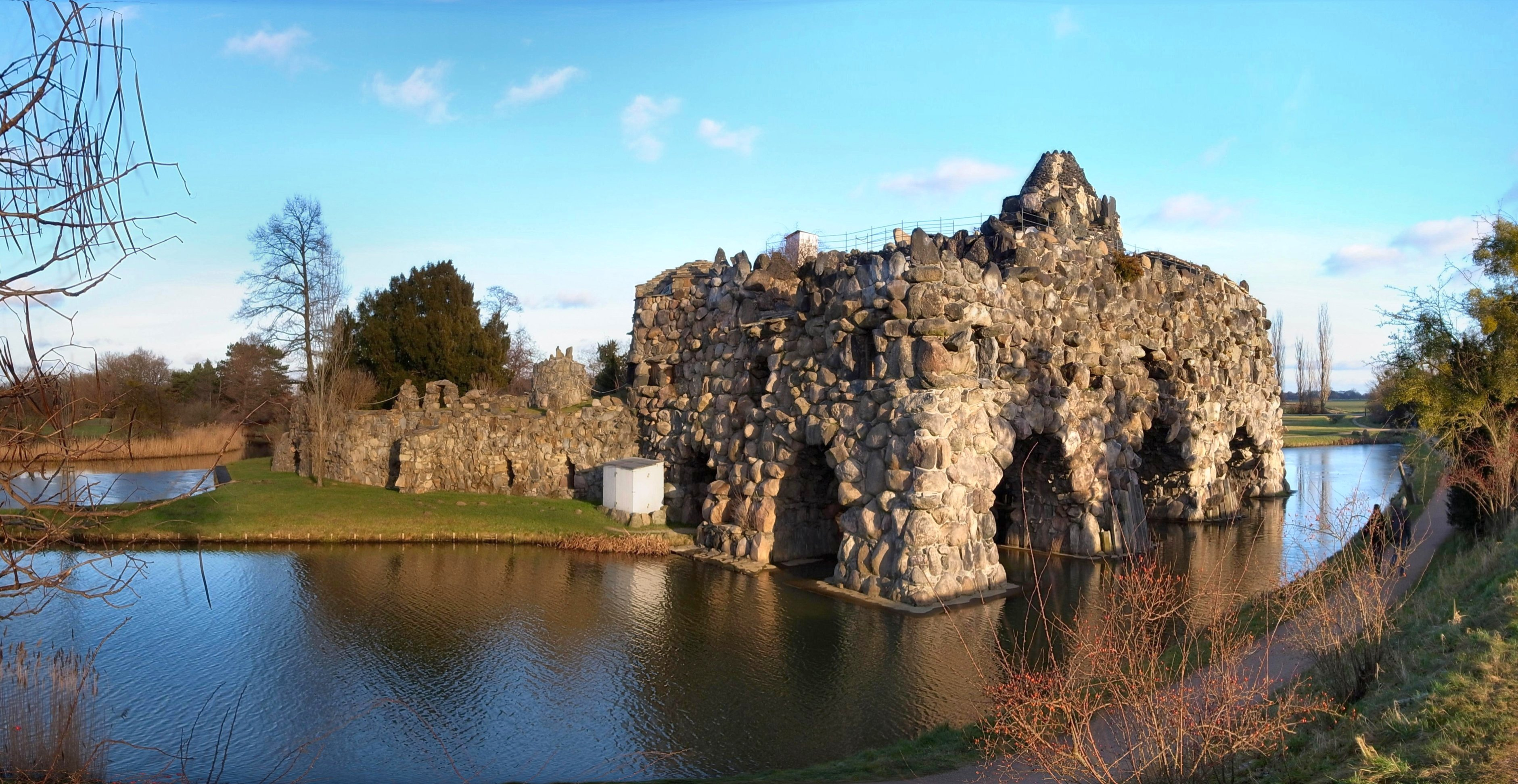 Wörlitz,künstlicher Vulkan auf der Insel „Stein“